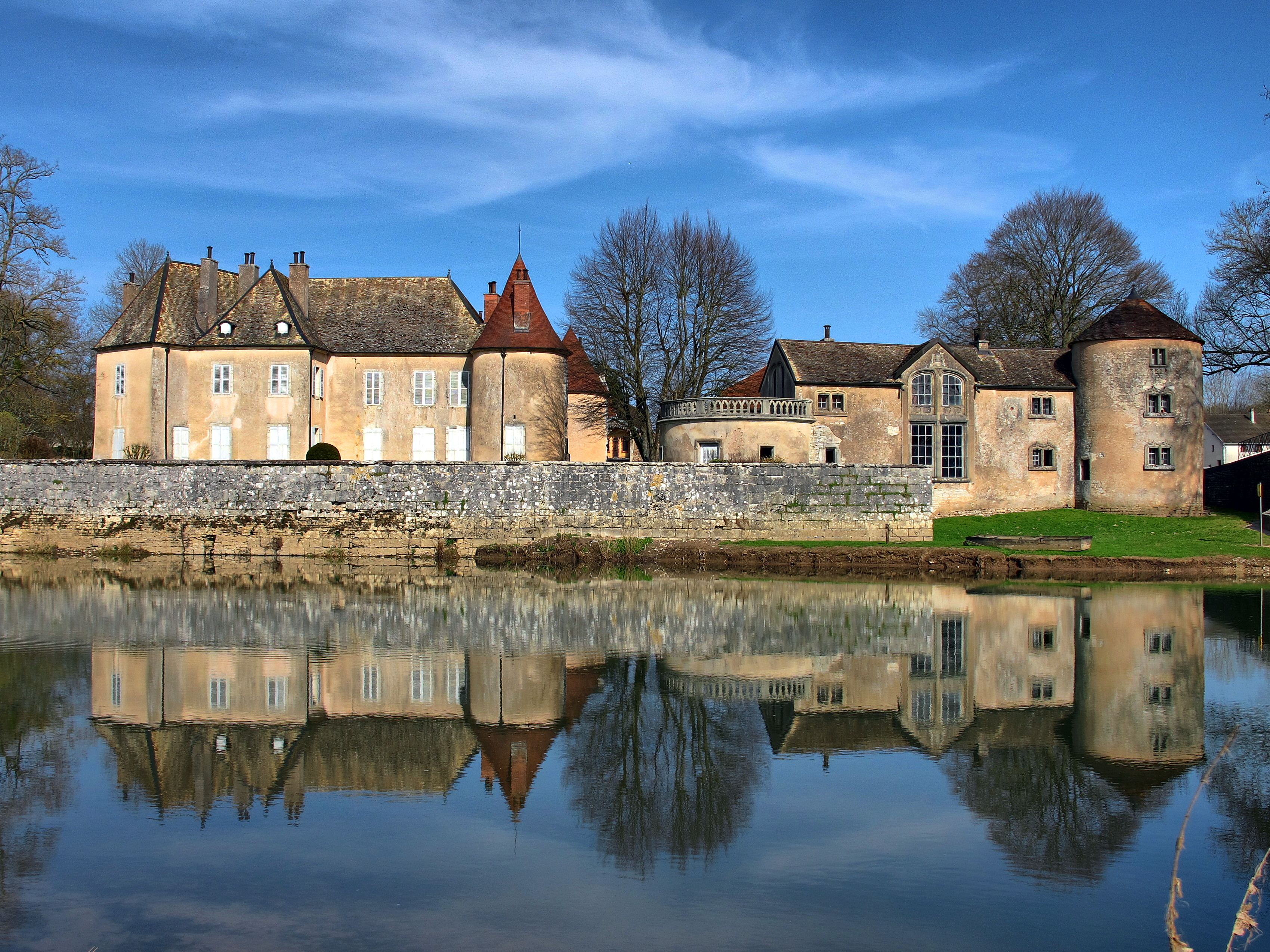 Inscrit aux monuments historiques sous le numéro PA00101696